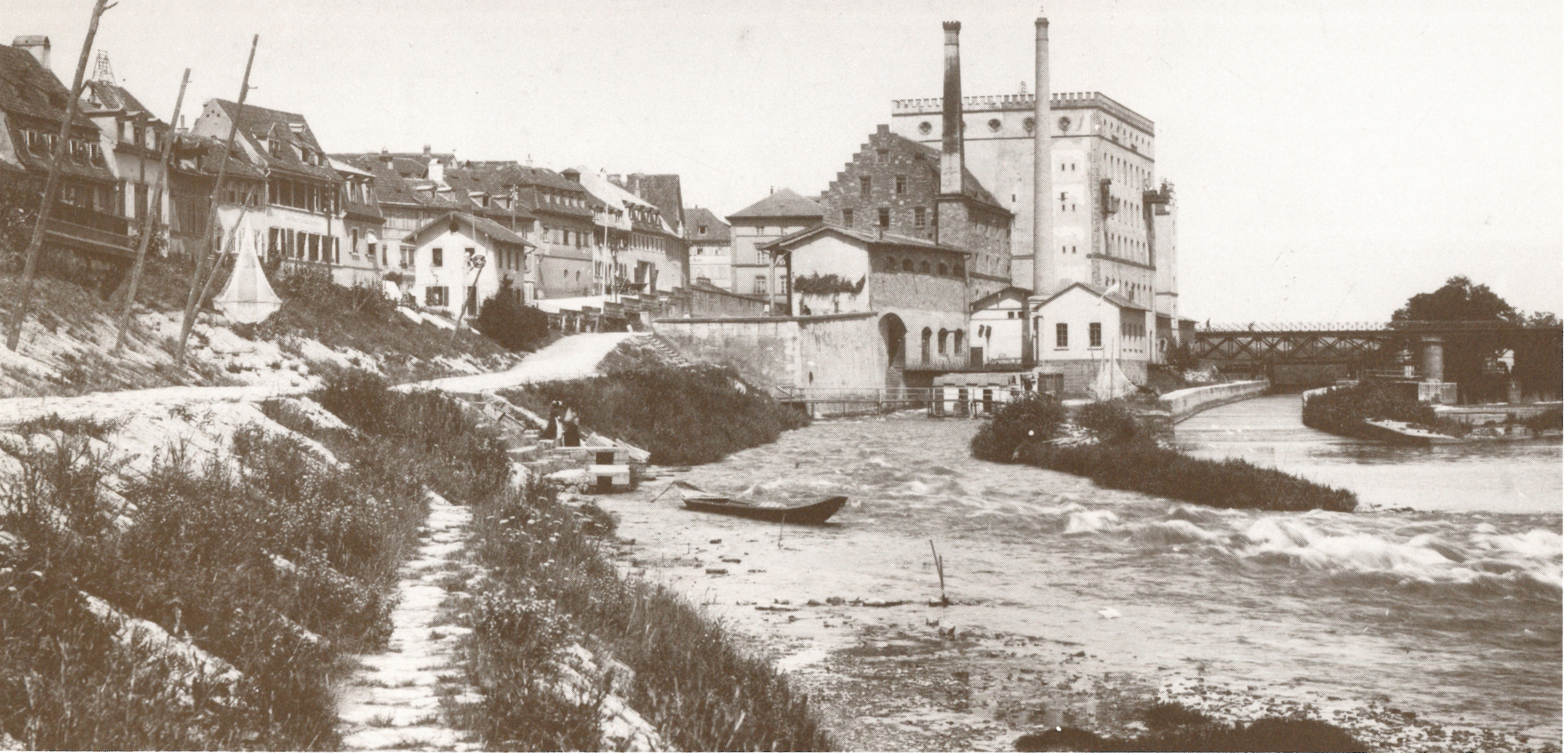 Schweinfurt Fotografie um 1902: Leinritt am Fischerrain, Pumpwerk, Loh- und Schneidemühle, Spinnenmühle, Floßkanal, Maxbrücke unterhalb Brücke Weber'sches Strudel- und Wellenbad